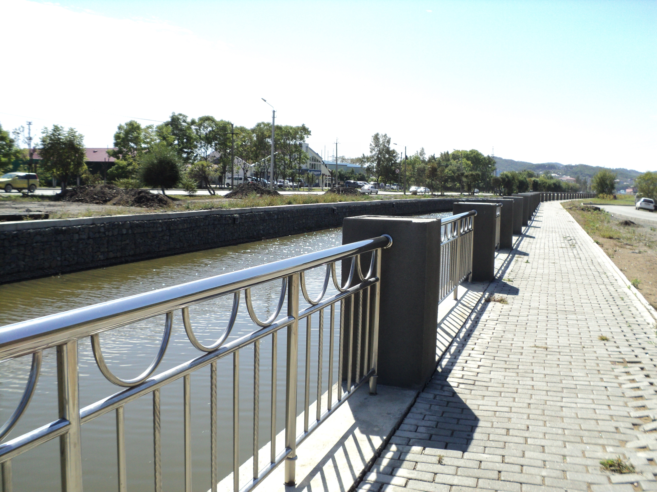 Набережная реки Каменки